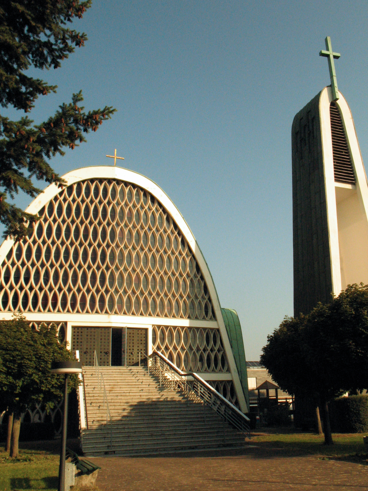 Evang. Heilig-Geist-Kirche außen